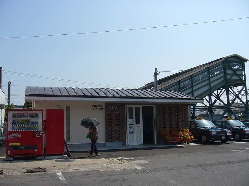 大町駅 投稿者撮影